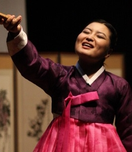 춘향가 눈대목